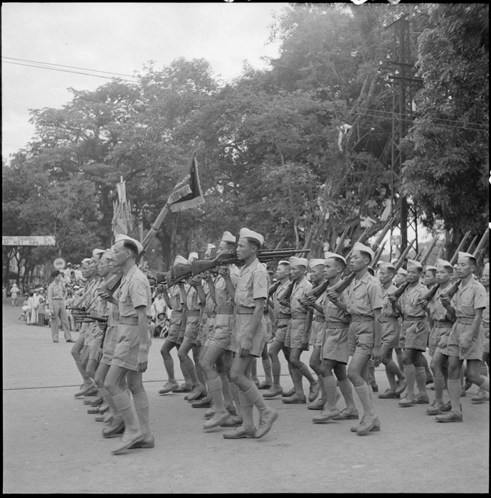 The photo of Vietnamese National Army.